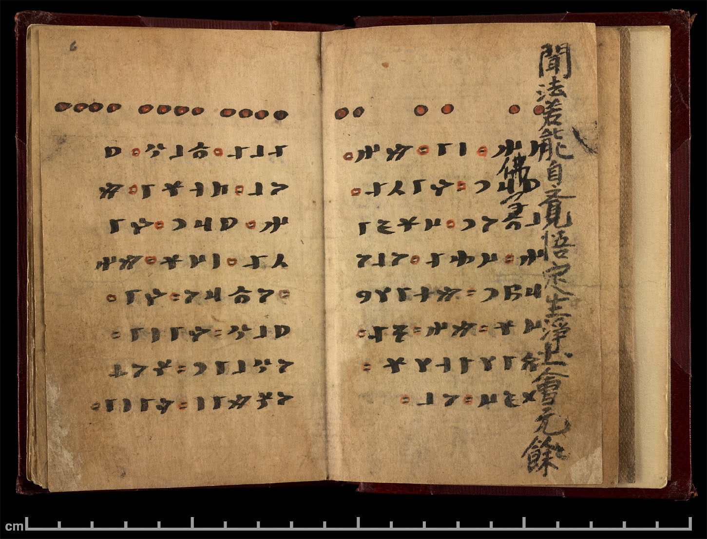 "Irk Bitig Fal Kitabı" page 6